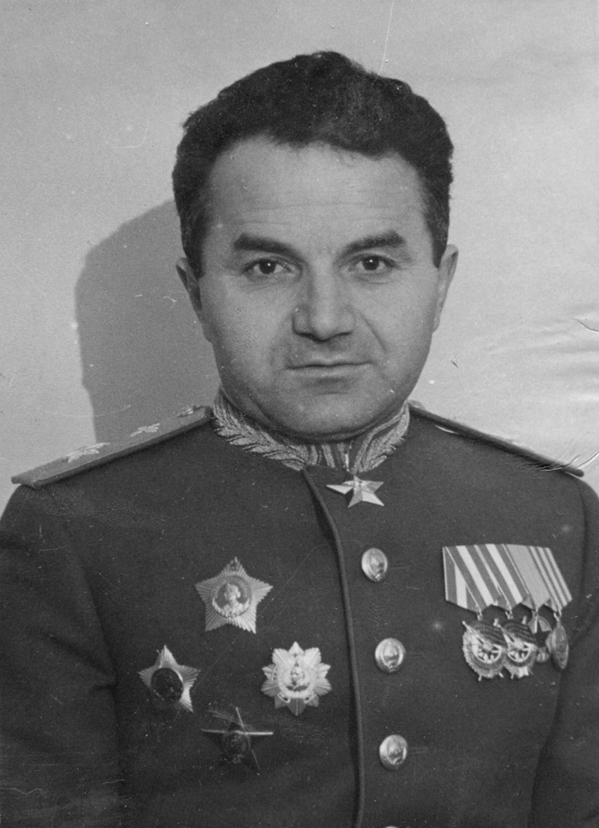 Маршала Авиации РККА Сергей Александрович Худяков